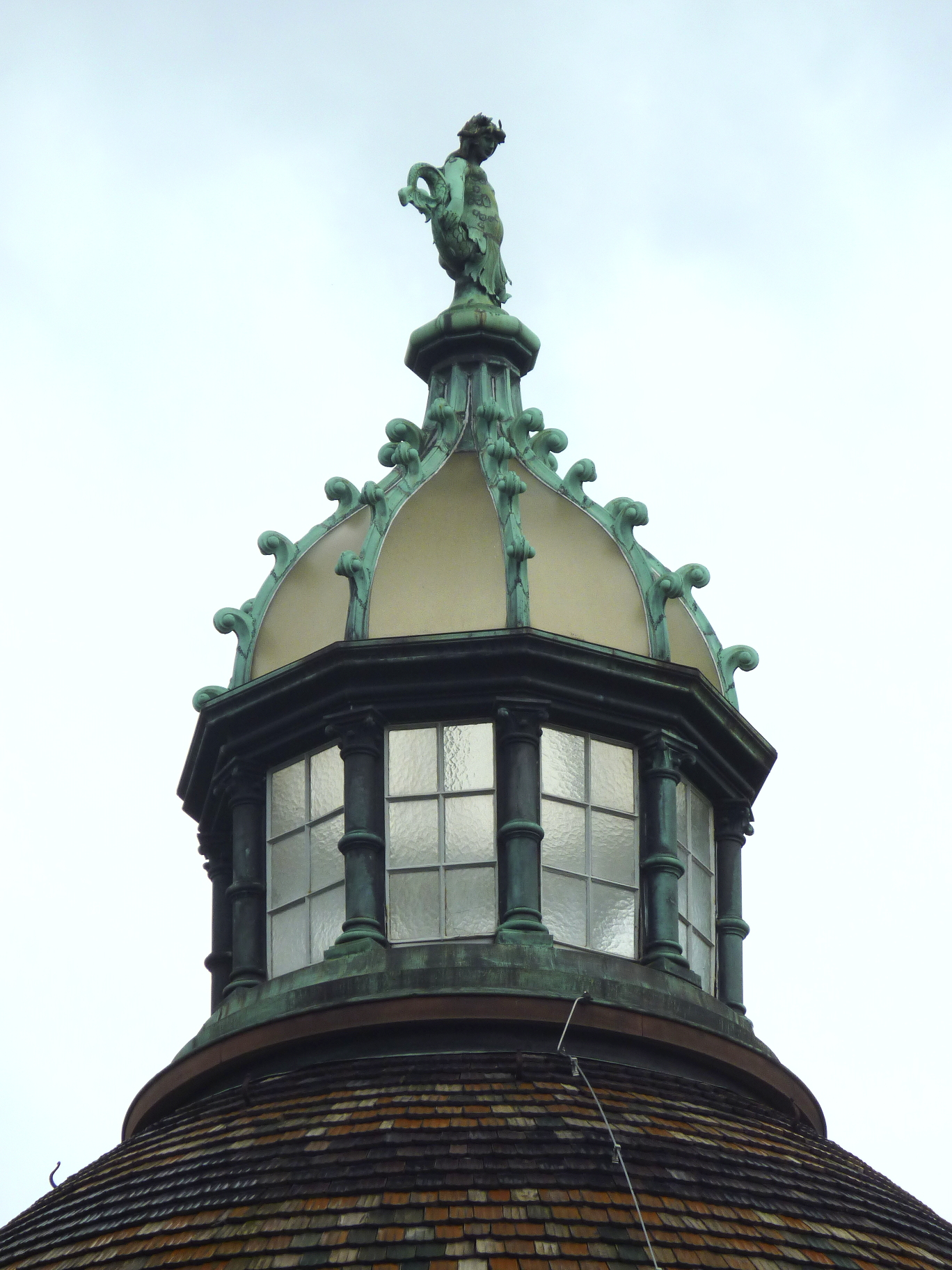 Stadt Frankfurt am Main: Das Wasserwerk Hinkelstein ist ein Trinkwasser-Pumpwerk im äußersten Westen des Frankfurter Stadtwaldes auf der Gemarkung des Stadtteils Schwanheim. Das Foto zeigt eine Detailansicht des 1894 eingeweihten, unter Denkmalschutz stehenden Backstein-Kuppelbaus über dem Pumpwerk. Die verglaste Laterne auf der Spitze der Kuppel, verziert mit der Figur einer Wassernixe, dient als Oberlicht. Ansicht von Norden